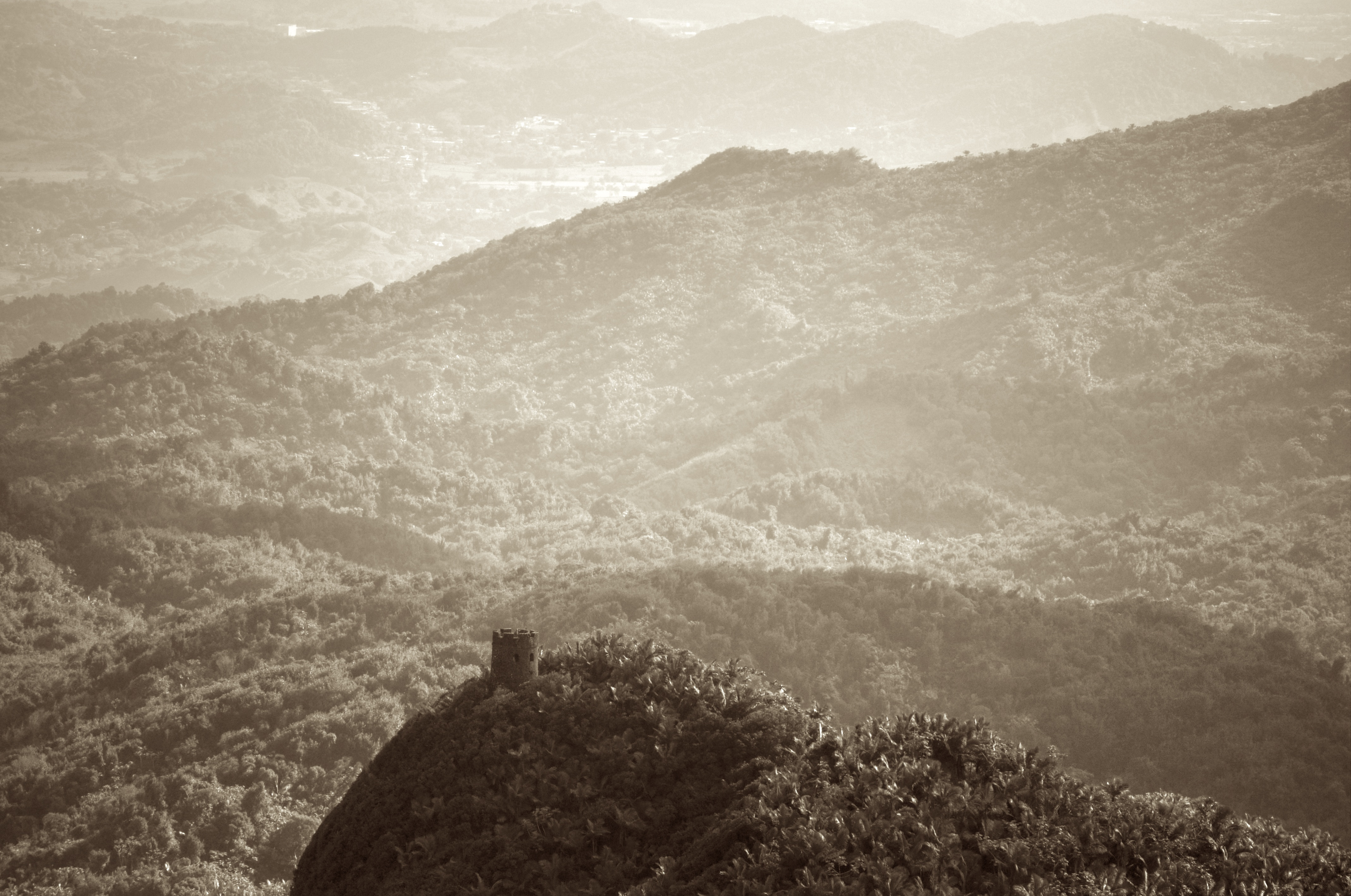 Mameyes II, Río Grande 00745, Puerto Rico